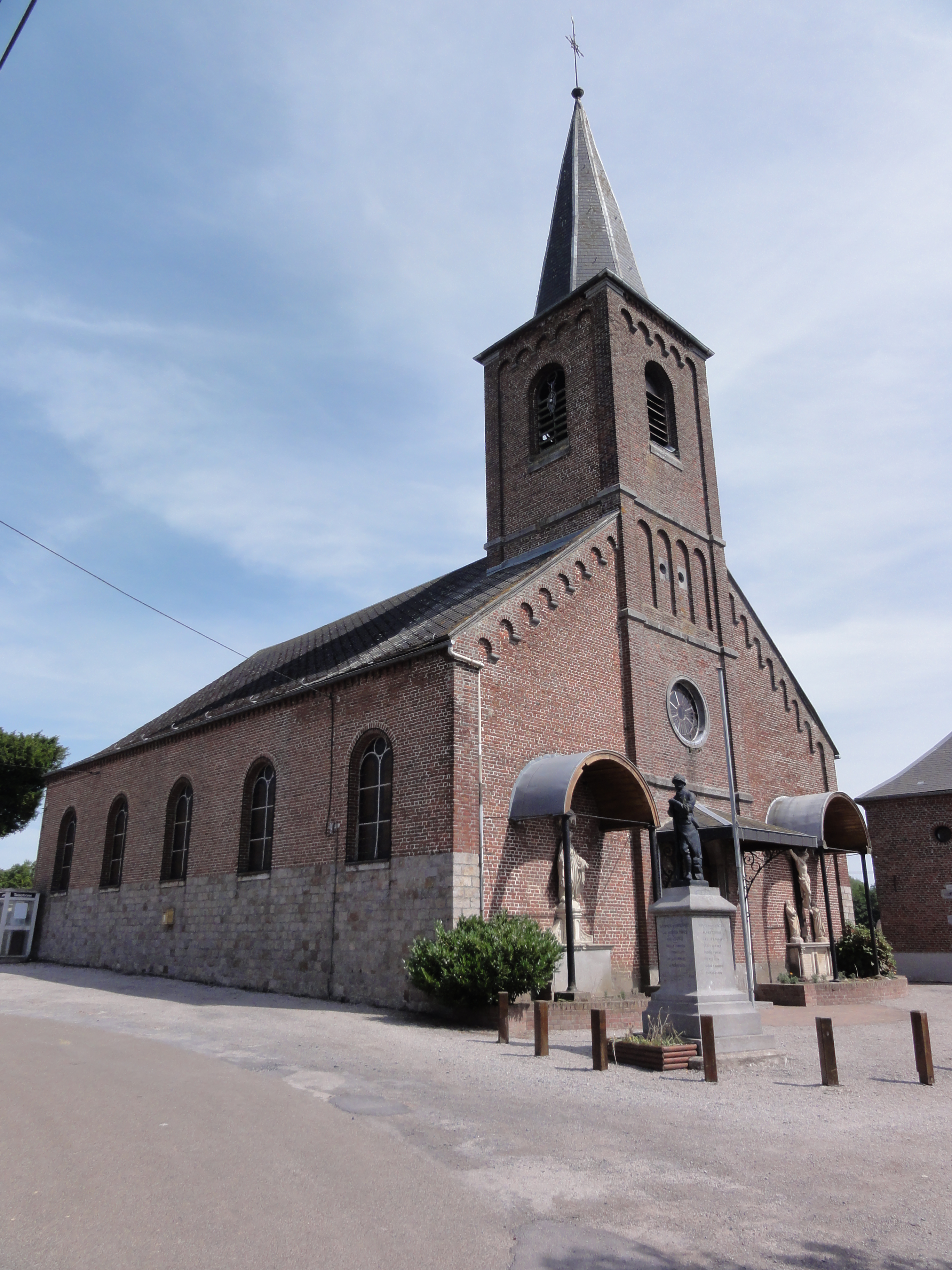 Amfroipret (Nord, Fr) église .